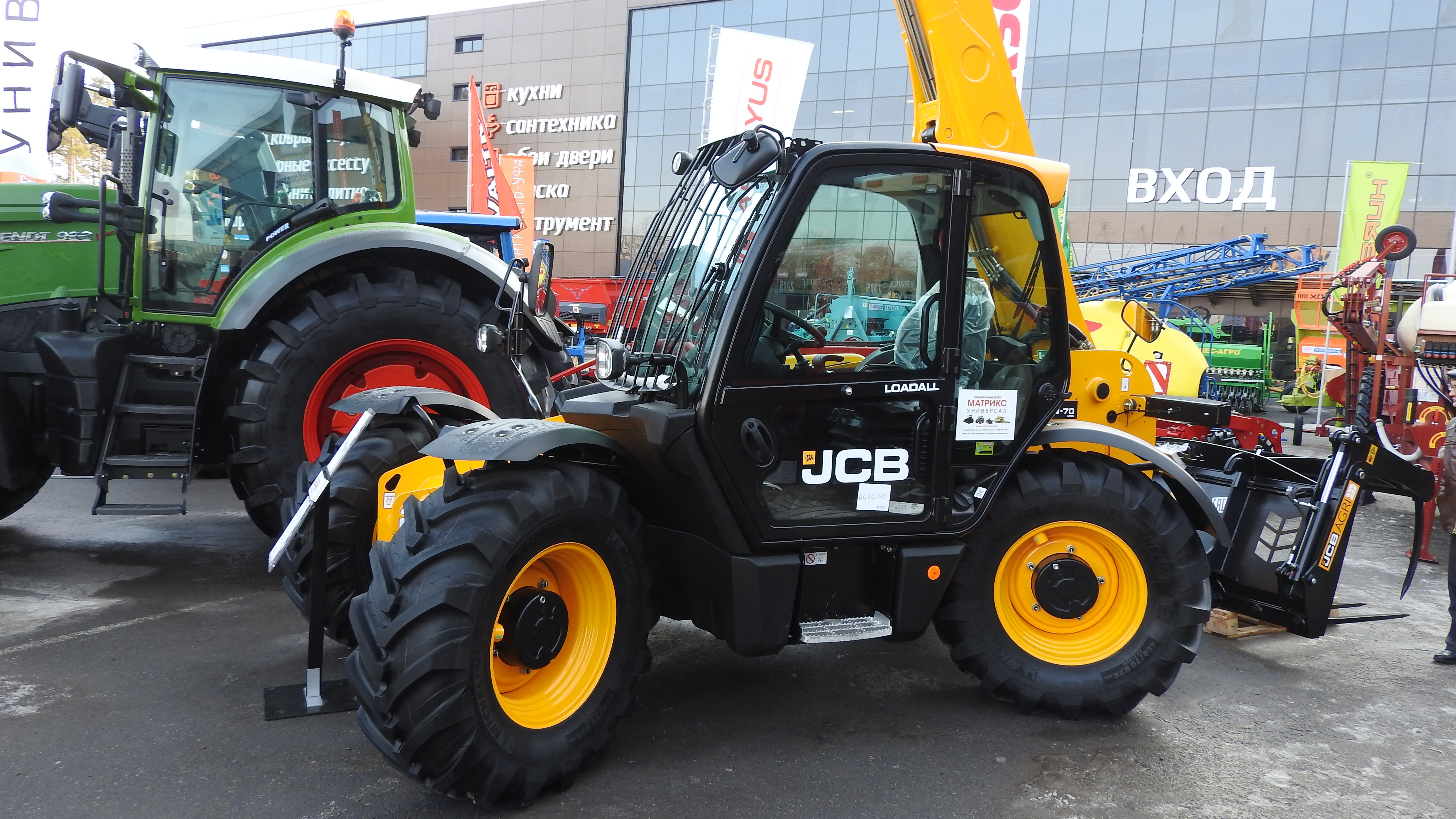 Выставка АГРО в Уфе